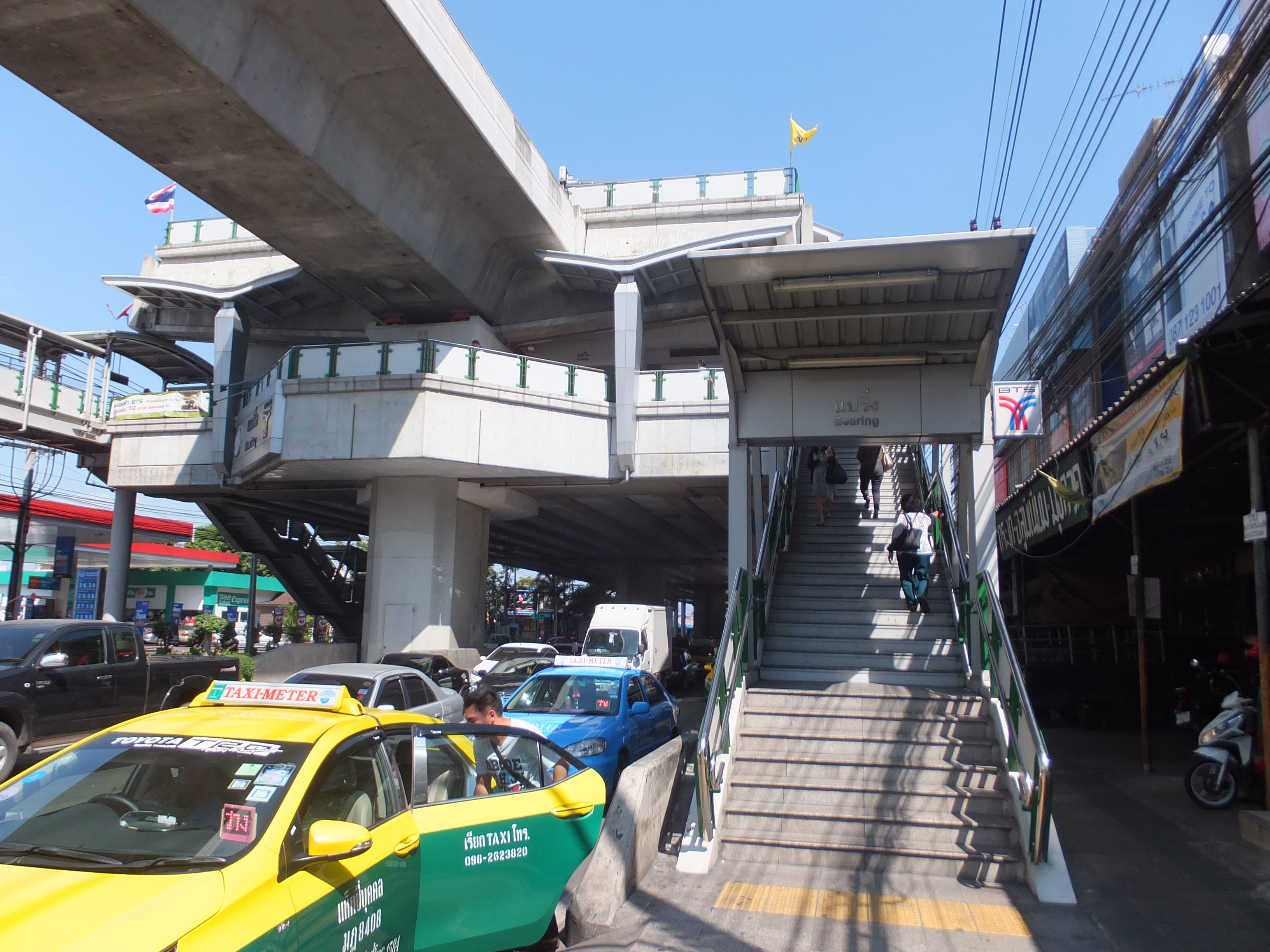 ベーリング駅入口（バーンナー駅に向いて。後方は延伸工事部分）